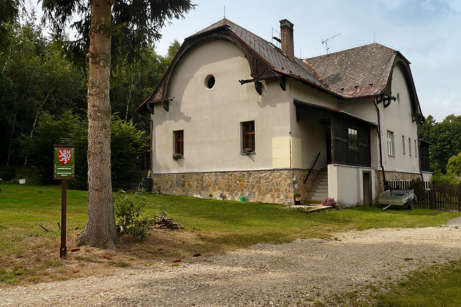 Přírodní památka Ledce - hájovna